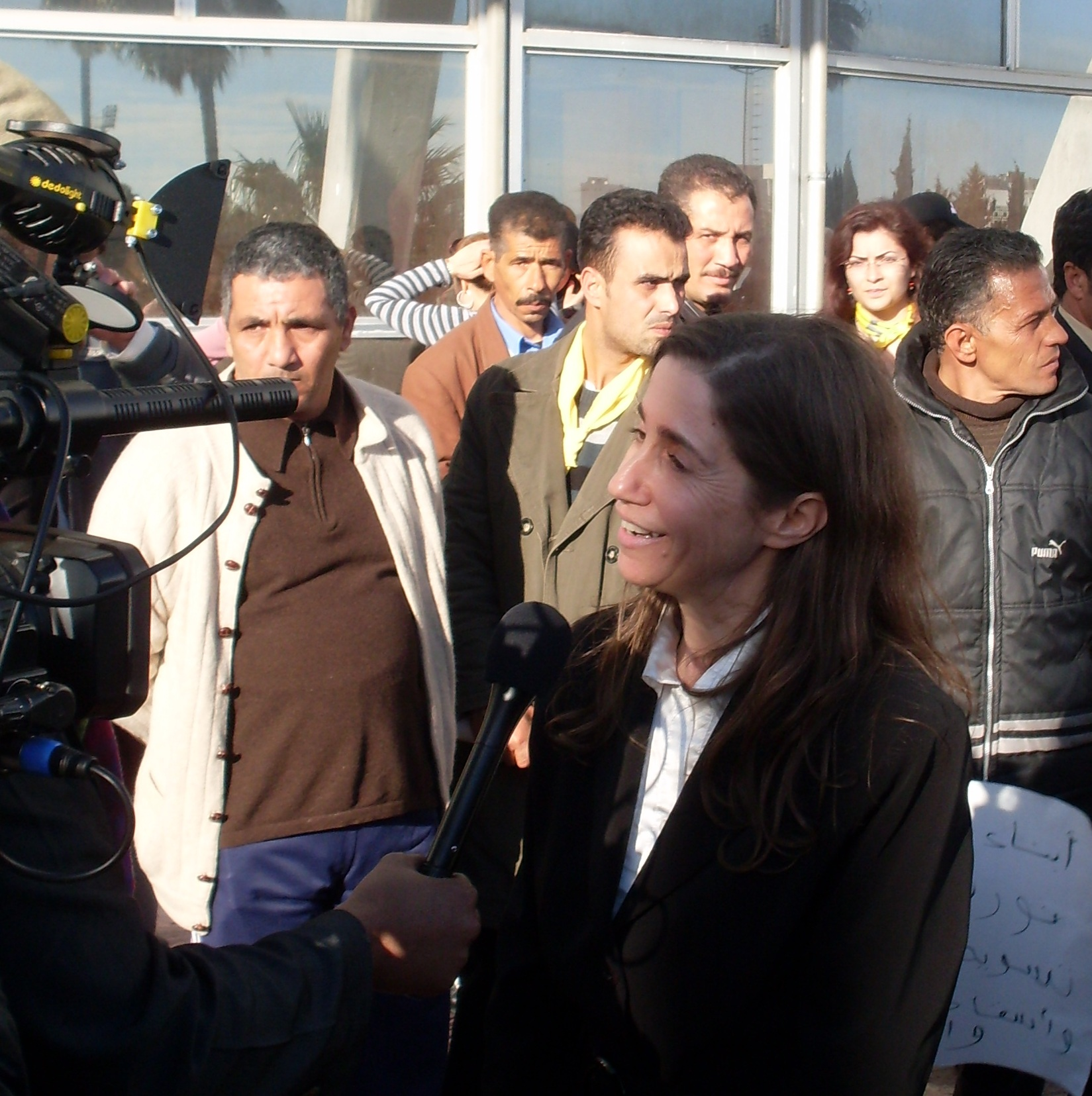 Maya Jribi dans une interview après un meeting du Parti démocrate progressiste à Tunis